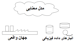 رابطه یک «مدل داده مفهومی» با «انبار داده» و «جهان واقعی» در این شکل نشان داده شده است.